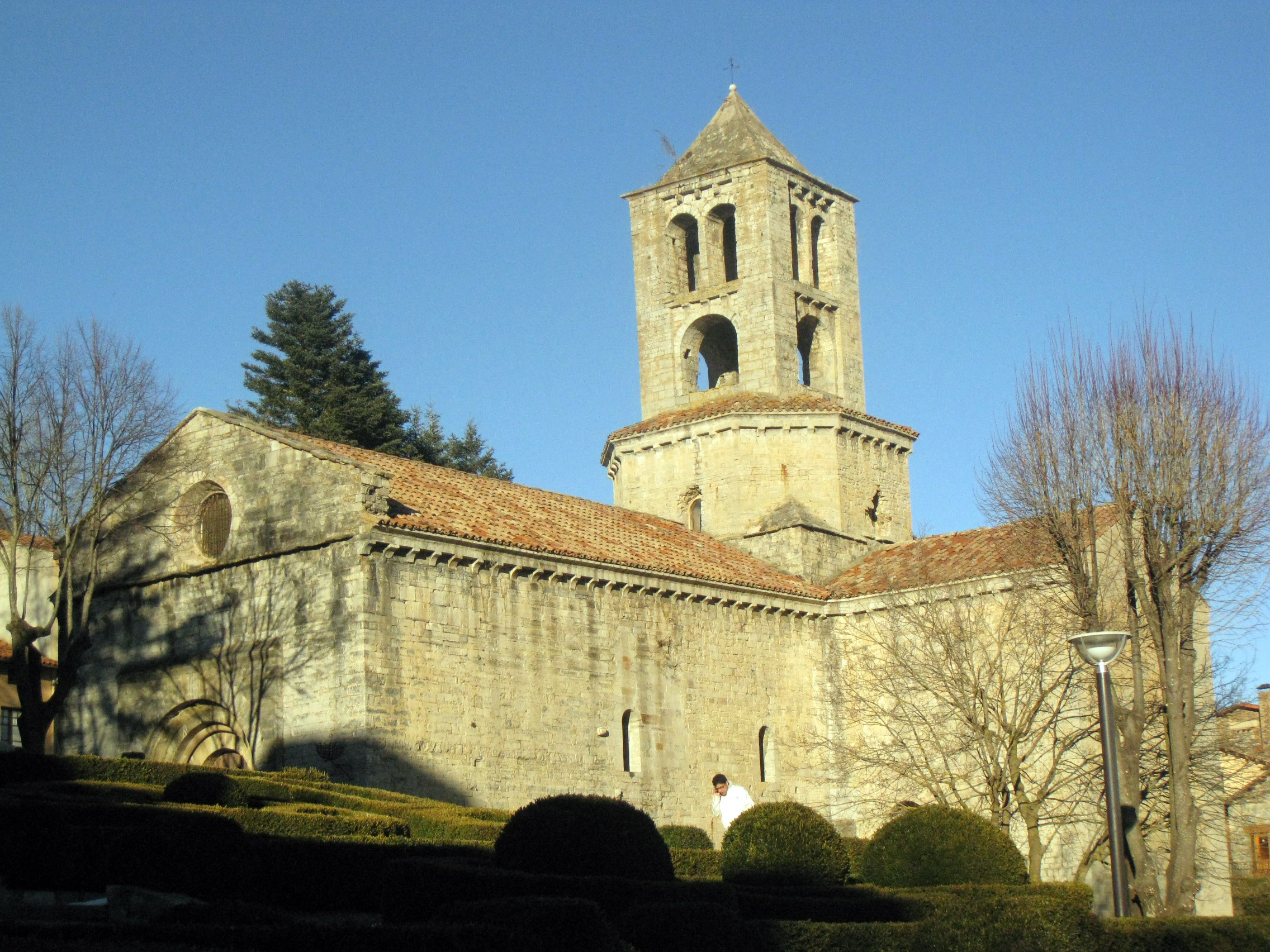 Monestir de Sant Pere (Camprodon)